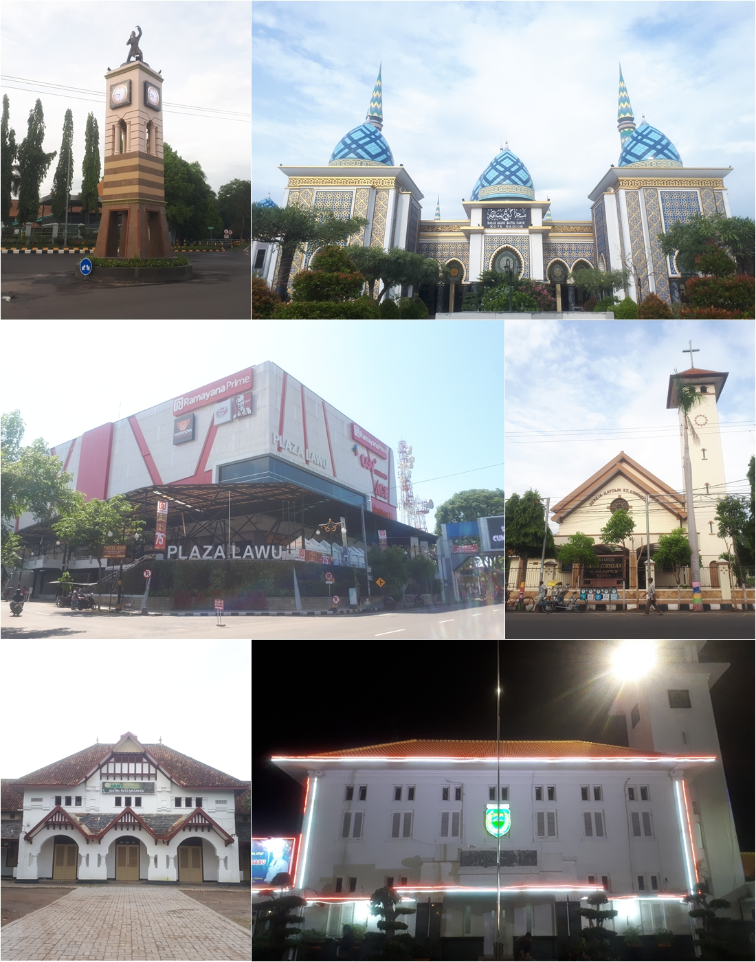 Menampilkan tempat-tempat umum di Madiun (searah jarum jam)1. Tugu Pendekar2. Masjid Agung Baitul Hakim3. Gereja Santo Cornelius4. Gedung Balai Kota Madiun5. Gedung di Kompleks Bosbow6. Plaza Lawu